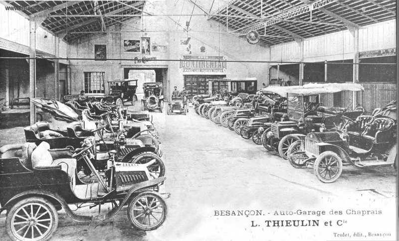 Le garage Thieulin des Chaprais, à Besançon (Doubs, France).